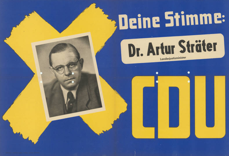 Deine Stimme: Dr. Artur Sträter Landesjustizminister CDU Abbildung: Porträtfoto - Stimmkreuz Plakatart: Kandidaten-/Personenplakat mit Porträt Drucker_Druckart_Druckort: Bilddruck u. Klischee Lambert Lensing G.m.b.H., Dortmund Objekt-Signatur: 10-009 : 160 Bestand: Landtagswahlplakate Nordrhein-Westfalen (10-009) GliederungBestand10-18: Landtagswahlplakate Nordrhein-Westfalen (10-009) » Landtagswahl am 18.6.1950 » CDU » mit Porträtfoto Lizenz: KAS/ACDP 10-009 : 160 CC-BY-SA 3.0 DE